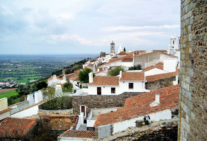 Portugal Monsaraz